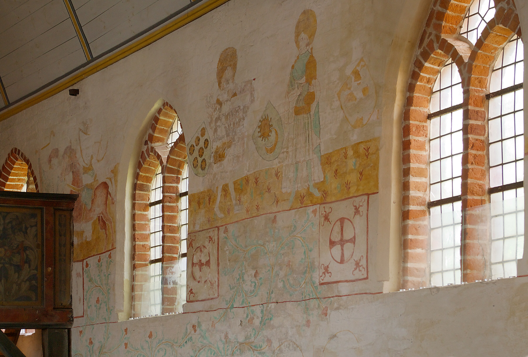 St. Nikolai-Kirche Altefähr, Rügen. Malerei an der Südwand des Kirchenschiffs